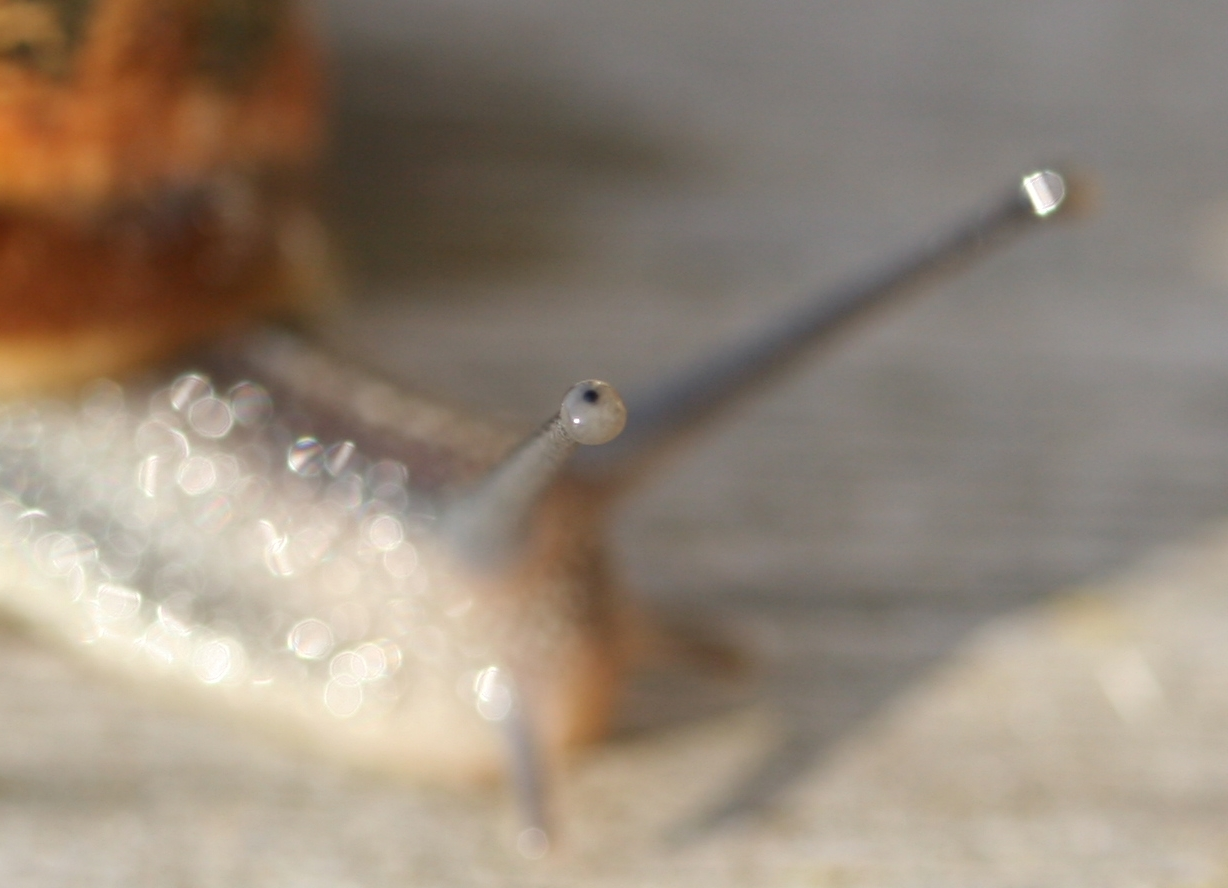 Snail_eye 14 april 2006